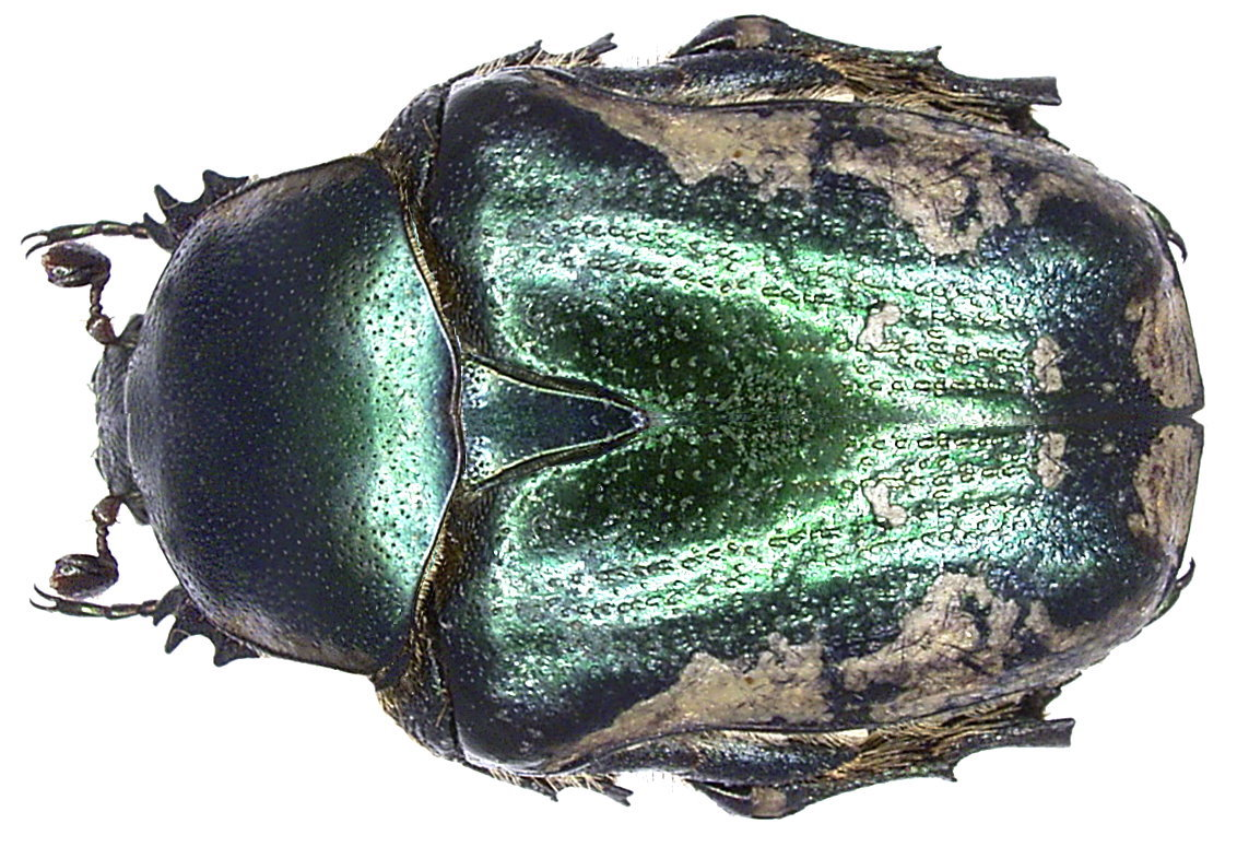 Familie: Scarabaeidae Groesse: 23 mm Verbreitung: Südeuropa, Westasien, Ägypten Fundort: Fundort: Türkei, Bergama, Pergamon leg. det. U.Schmidt, 1997 Photo: U.Schmidt, 2006